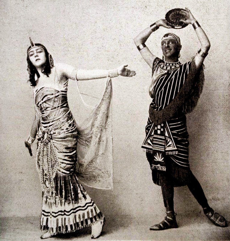 Марианна Эриковна Дерфельден и Владимир Петрович Лазарев в египетских костюмах на маскараде у графини М.Э. Клейнмихель.